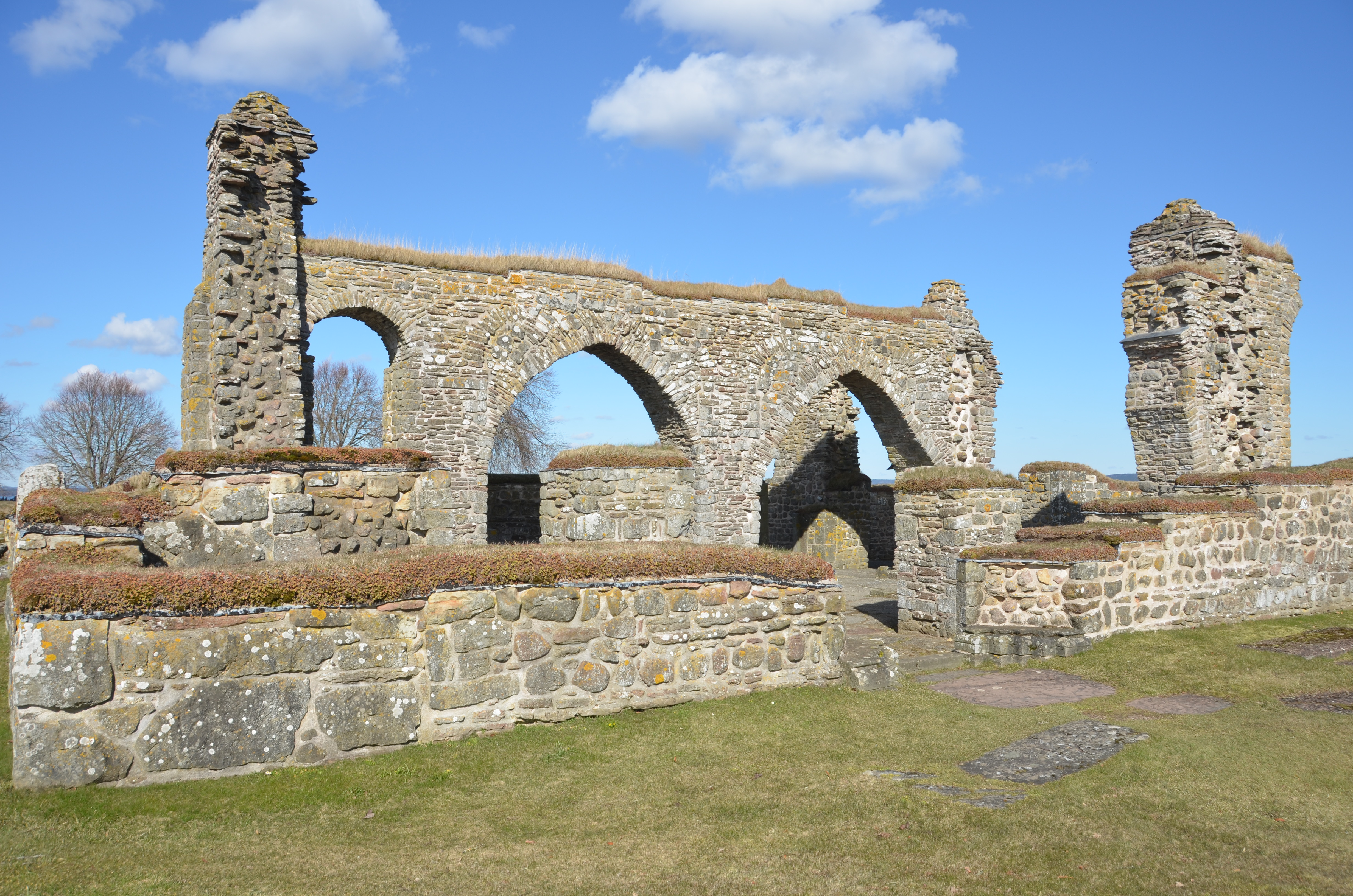 Gudhems klosterruin (2015)